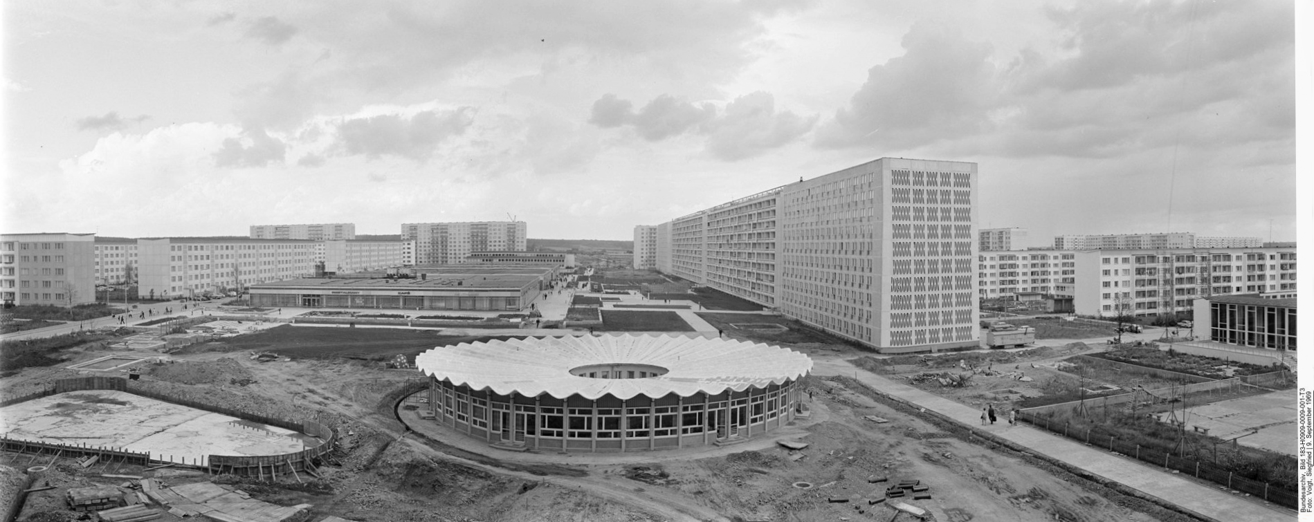 Zentralbild / Voigt / 9.9.69 / ku / Halle-Neustadt: Die junge Stadt Halle-Neustadt mit 25.000 Einwohnern und 9.000 Wohnungen hatte im Juli den 5. Jahrestag der Grundsteinlegung und den 2. Jahrestag der Verleihung der Stadtrechte. Unser Panorama zeigt in der Bildmitte den interessanten Delta-Kindergarten, der nach einer neuen Bauweise errichtet wurde. Information added by Wikimedia users."Block 10", später Block 618 bis 621, Adresse heute: Zerbster Straße 25-43, 06124 Halle (Saale). Originale Beschreibungen von Bild 183-F0802-0013-001: "...die Montage des längsten Wohnblocks der DDR am 31.7.67 beendet. Das 385 m lange zehngeschossige Gebäude wuchs in rund sechs Wochen empor. Die Montage-Arbeiter verbauten dabei 23000 Elemente im Gesamtgewicht von 100000 Tonnen. Der Wohnriese bietet in 320 Mehrzimmer- und 536 Einraumwohnungen Platz für rund 2000 Menschen. Ein Dachgarten wird noch angelegt; einige Räume werden zu einer Kinderkrippe mit 160 Plätzen ausgebaut. Beim Bau des Blocks hat sich das Kiewer Beispiel ausgezeichnet bewährt." Im Vordergrund der 1968 erbaute kreisförmige Deltakindergarten "Buratino", dessen Dach aus den von H. Müller entwickelten Delta-HP-Schalen besteht. Der Begriff 'Delta' bezieht sich auf den konischen Verlauf der Betonschalen.